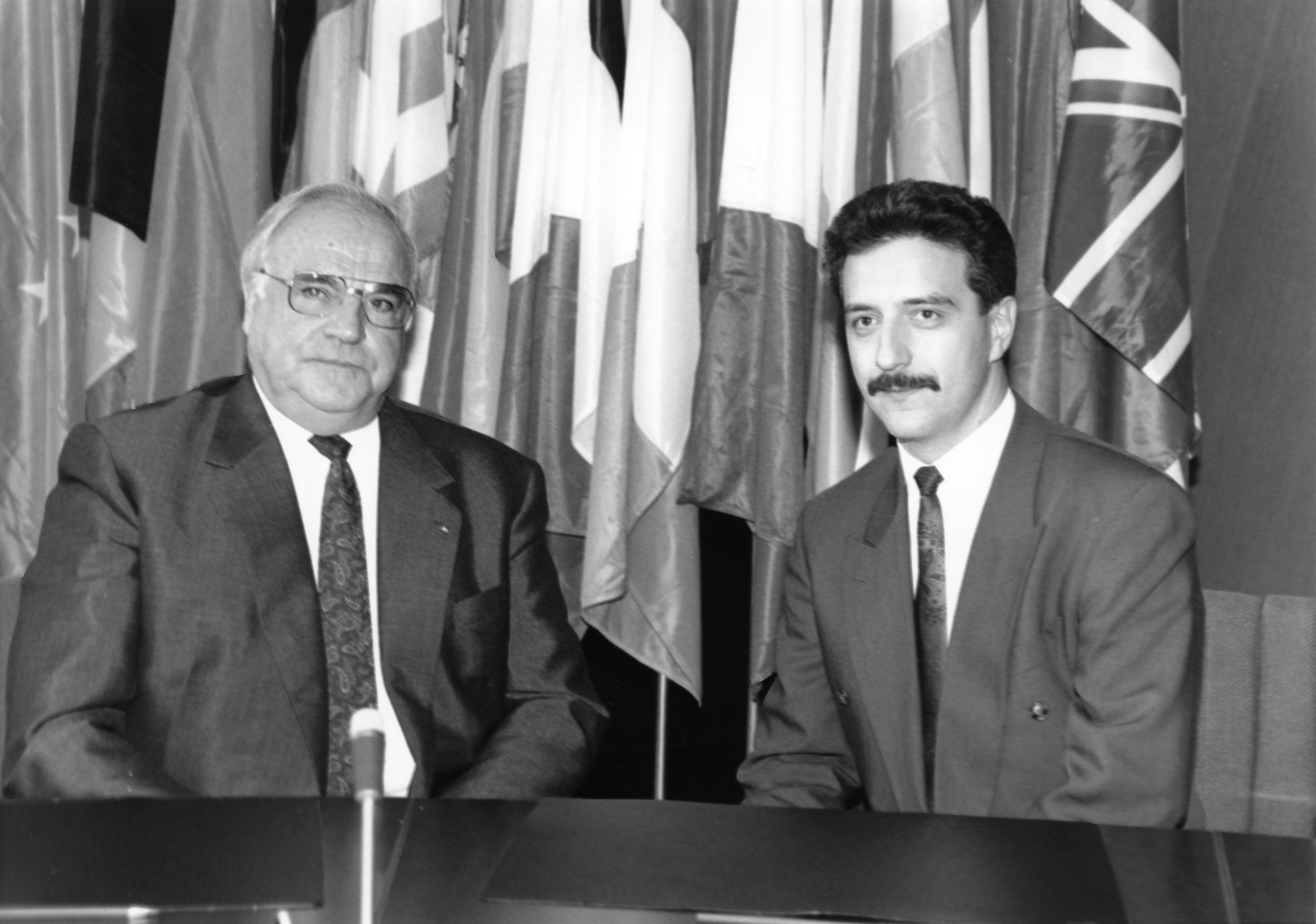 Stanisław Tilich se spolkovým kancléřem Helmutem Kohlem v roce 1994 ve Štrasburku